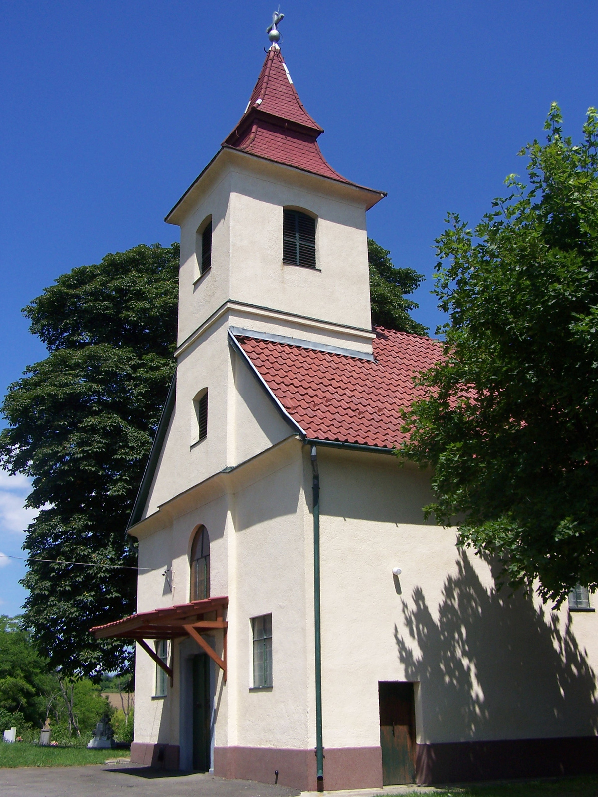 Kisboldogasszony római katolikus templom (Vácegres, Hámán Kató u.) This is a photo of a monument in Hungary. Identifier: 7564